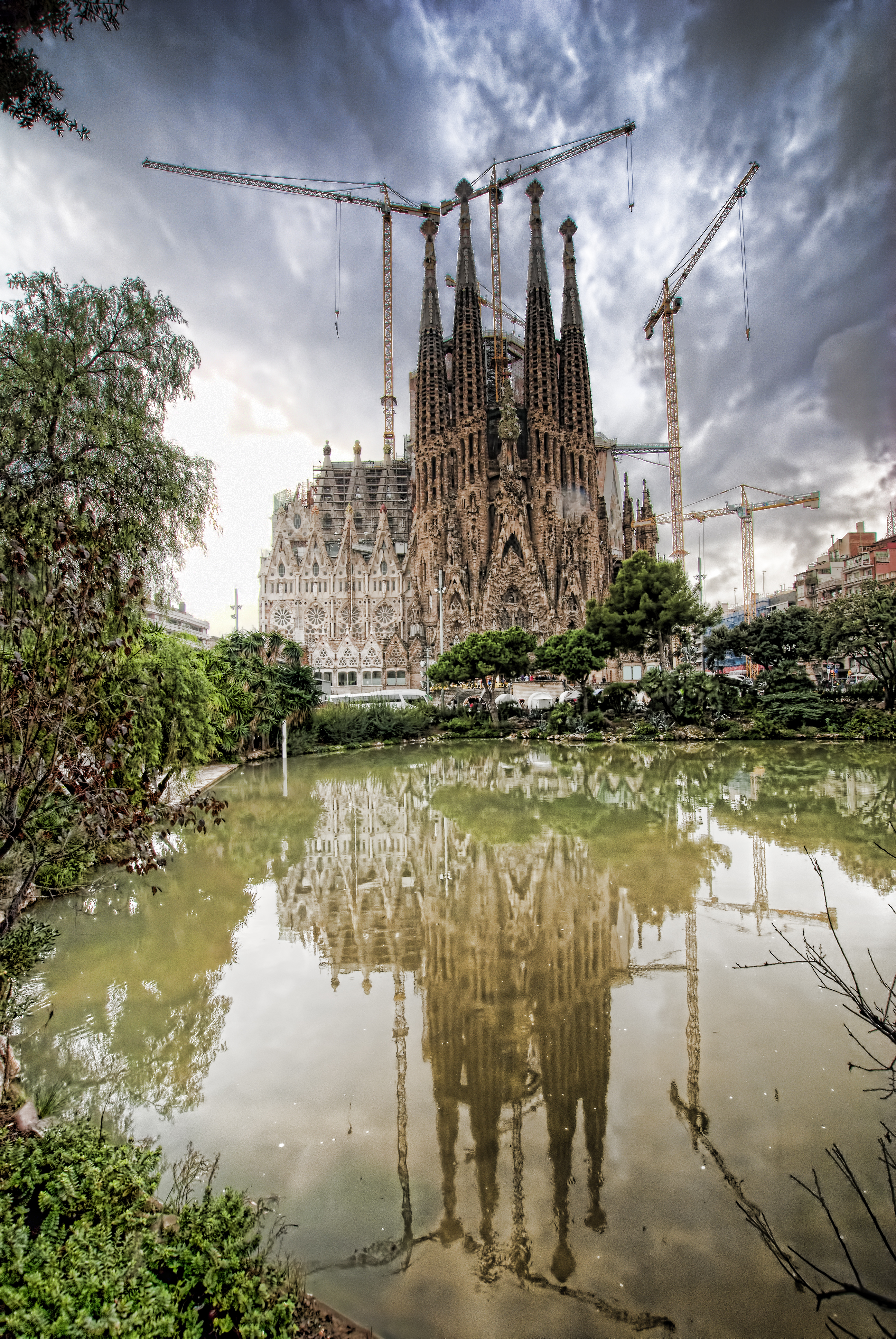 Gaudi's Sagrada Familia cathedral, reflection. have a look to the complete picture tour here. Absolutely a must if you visit Barcelona! Si quieres ver el tour fotográfico completo pincha aquí Visita imprescindible en Barcelona